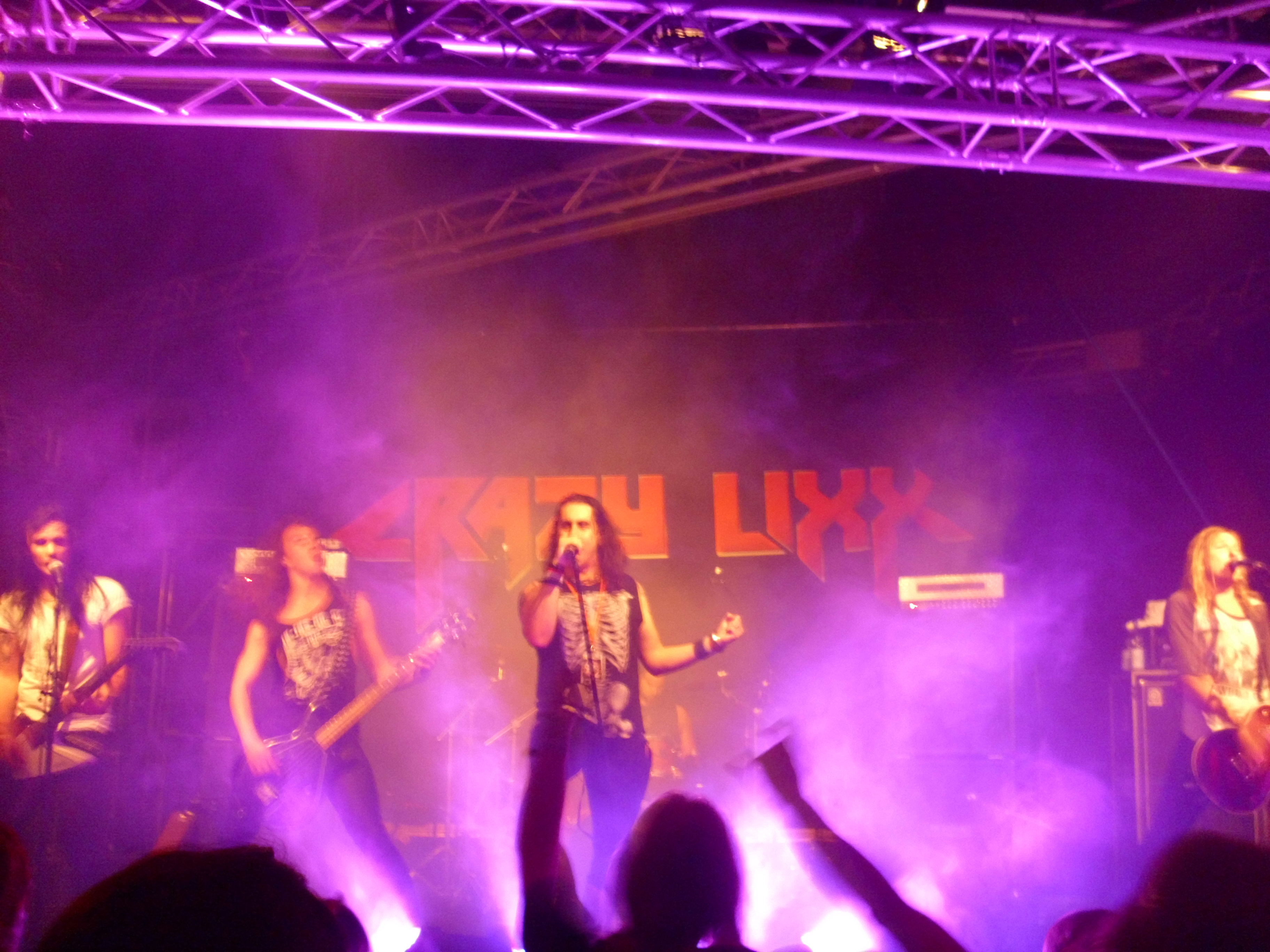 Crazy Lixx-Konzertfoto